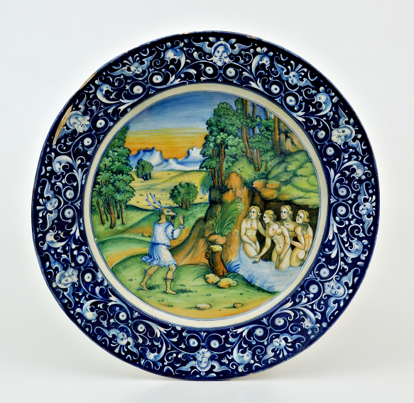 Piatto istoriato con decoro a grottesche